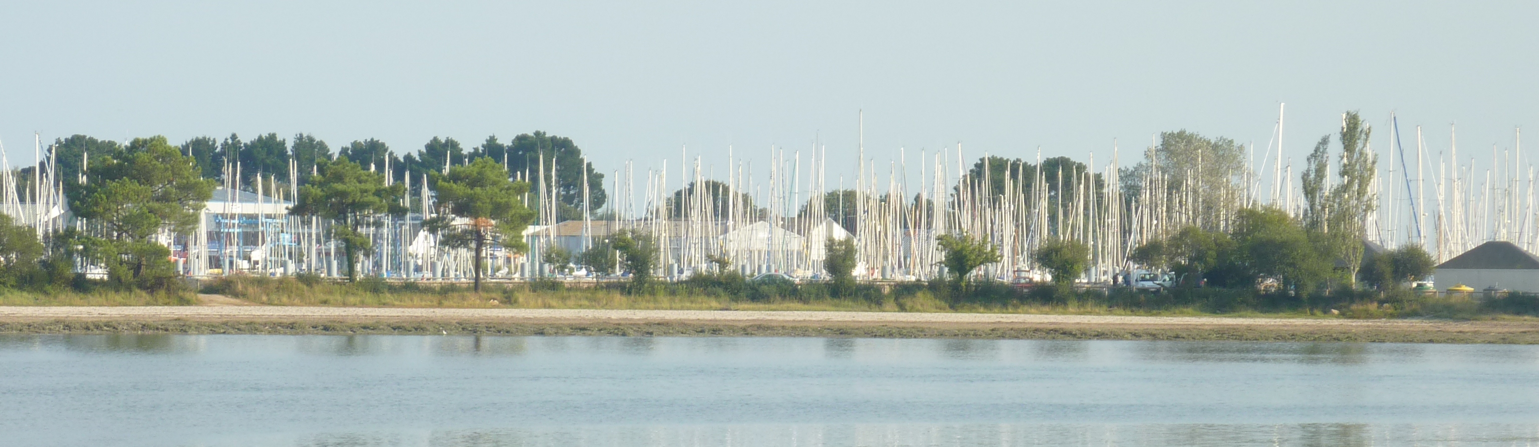 Port-La-Forêt : la forêt de mâts vus de ria de La Forêt-Fouesnant